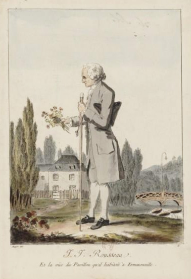 Portrait de Jean-Jacques Rousseau, en pied, tenant à la main un bouquet de fleurs, et la vue du Pavillon qu'il habitait à Ermenonville, estampe de Mayer